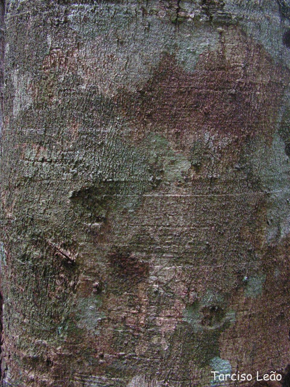 Local: Mata do Sabiá, Cabo de Santo Agostinho, Pernambuco, Brasil. Tipo de veg.: Floresta Ombrófila Densa Habito: árvore